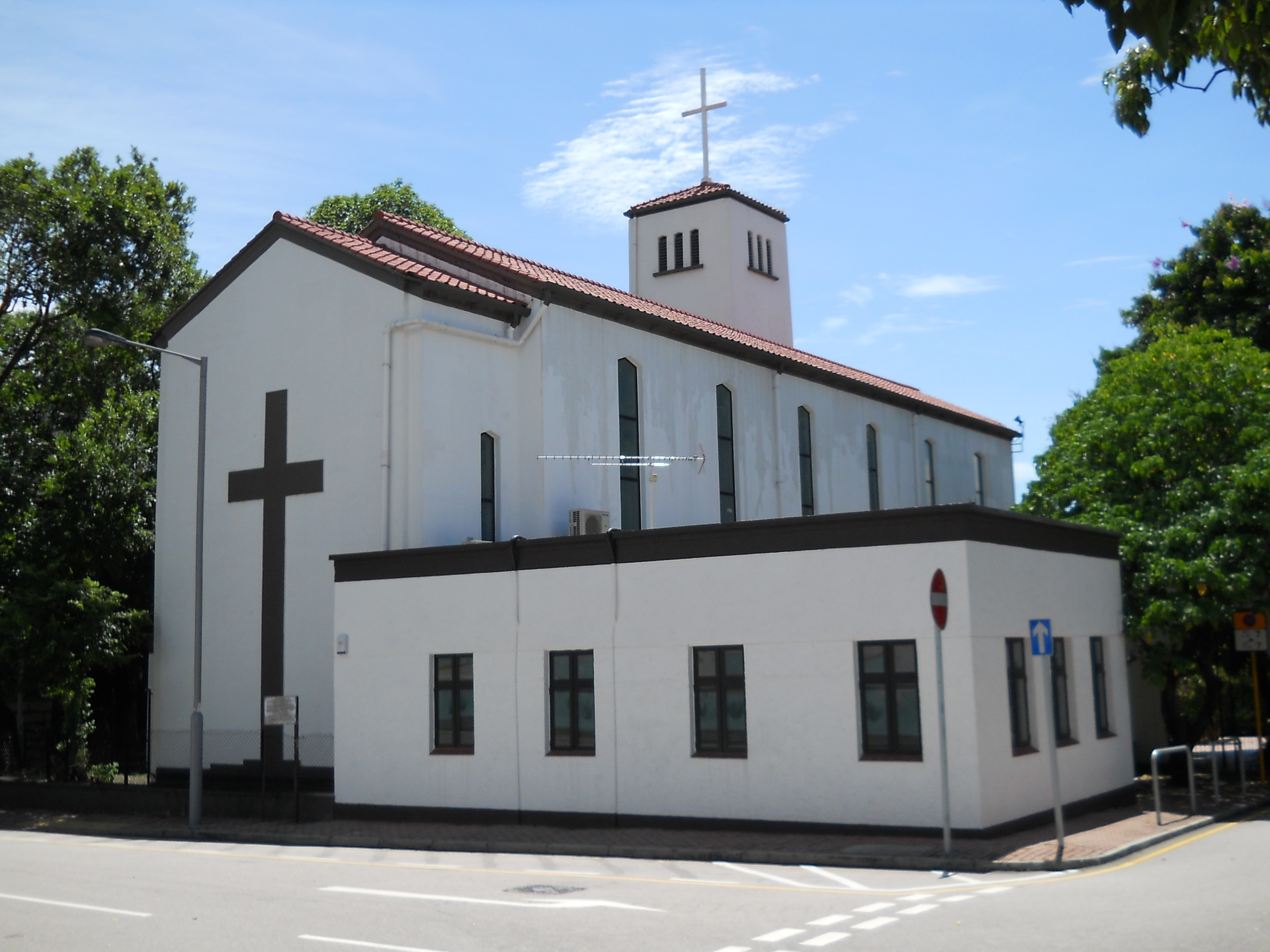 中文（香港）: 聖公會基督堂